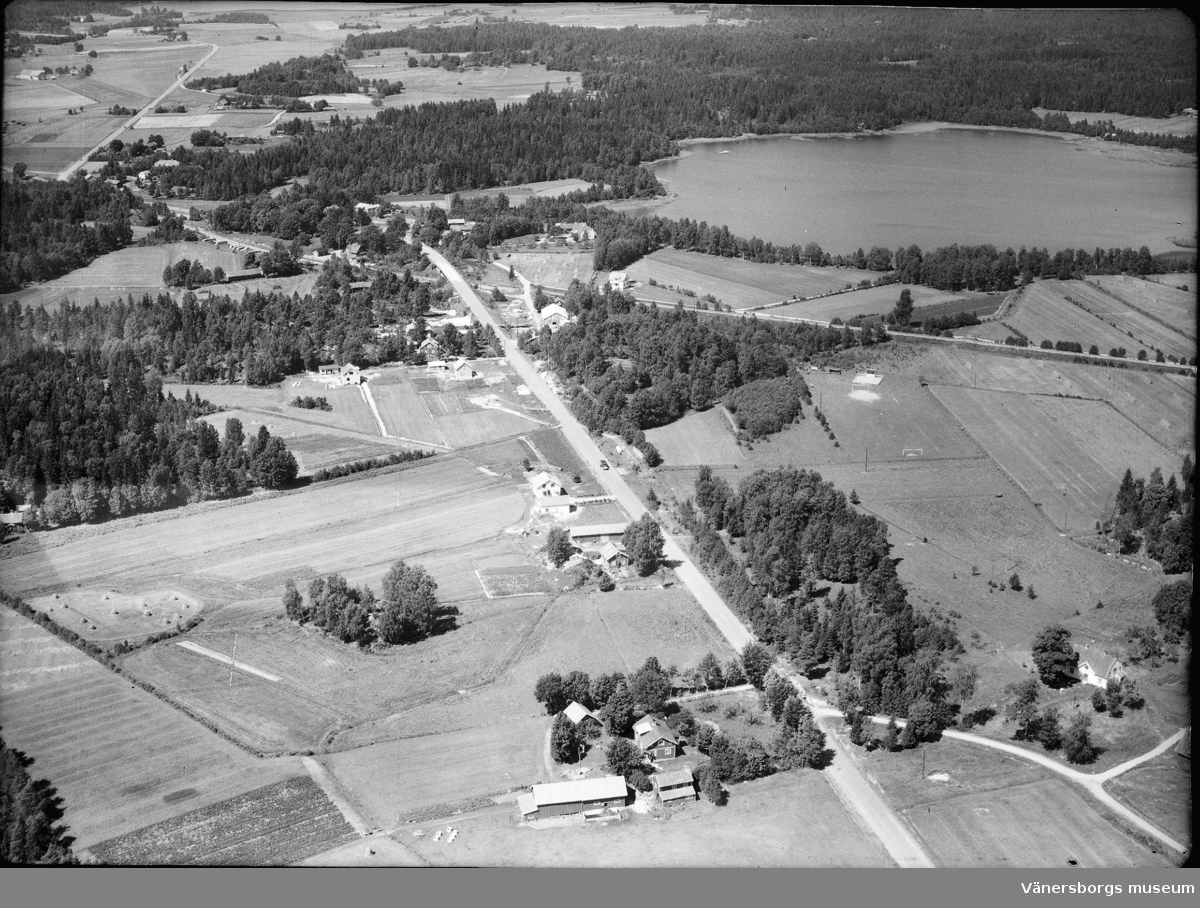 Anmärkningar: Förlag: Ryrs Speceri och Diverseaffär K 880 - Negativnr. INGÅR I SAMLING VM Foto